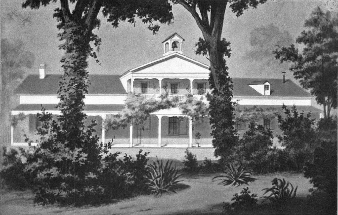 Sutters Hock-Farm am Feather River, die 1866 abbrannte. Fotografie in Privatbesitz.